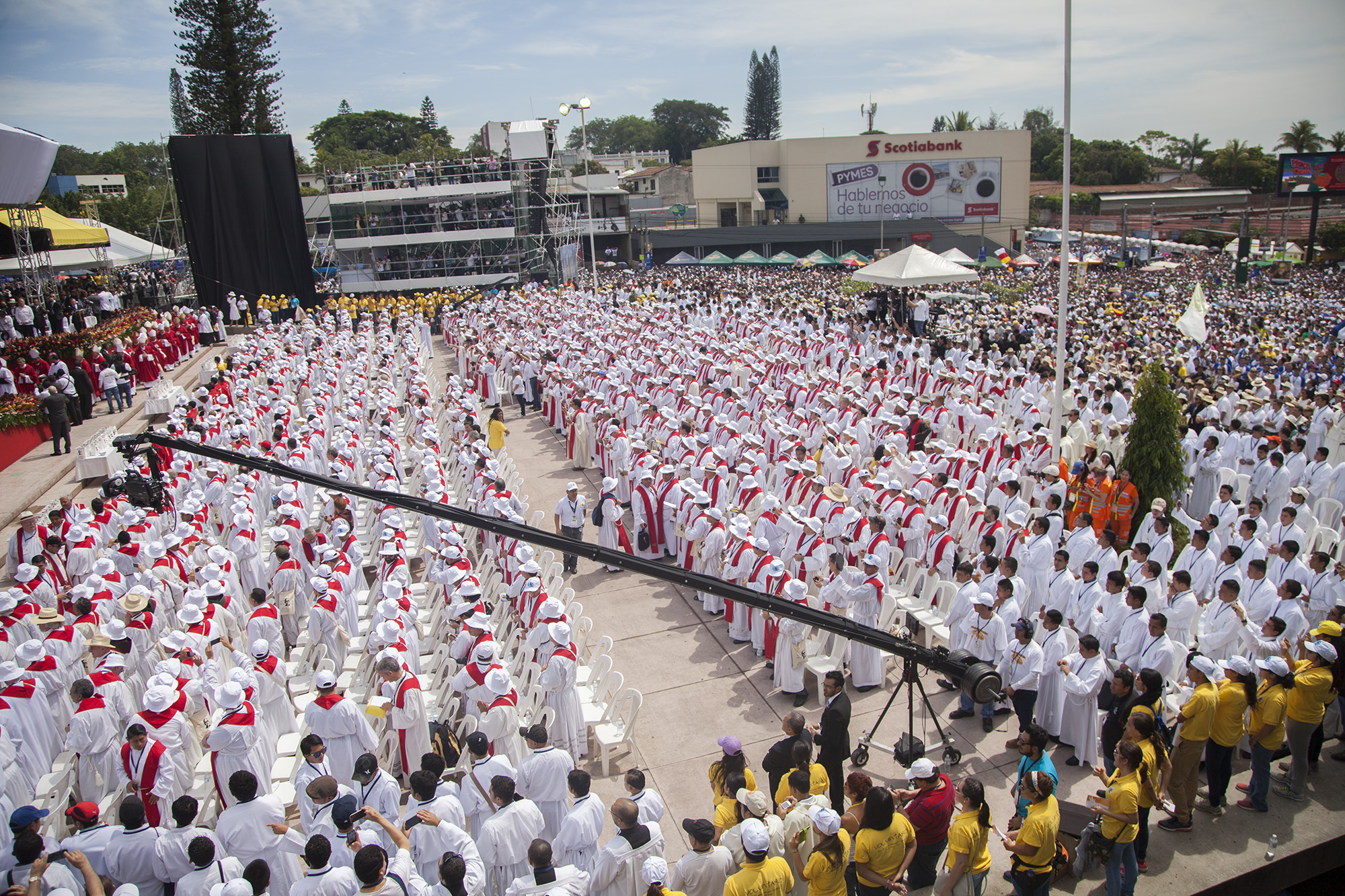 San Salvador (El Salvador), 22 de mayo de 2015. En la Plaza Salvador del Mundo se llevó a cabo la Beatificación de Monseñor Oscar Arnulfo Romero, asesinado el 24 de marzo de 1980 mientras celebraba la misa en la Capilla del Hospital La Divina Providencia. Foto: Luis Astudillo C. / Cancillería